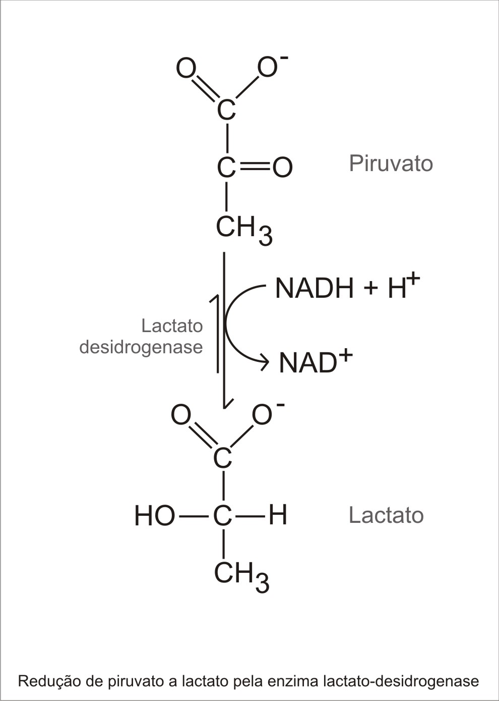 Figura ilustrativa da fermentação láctica